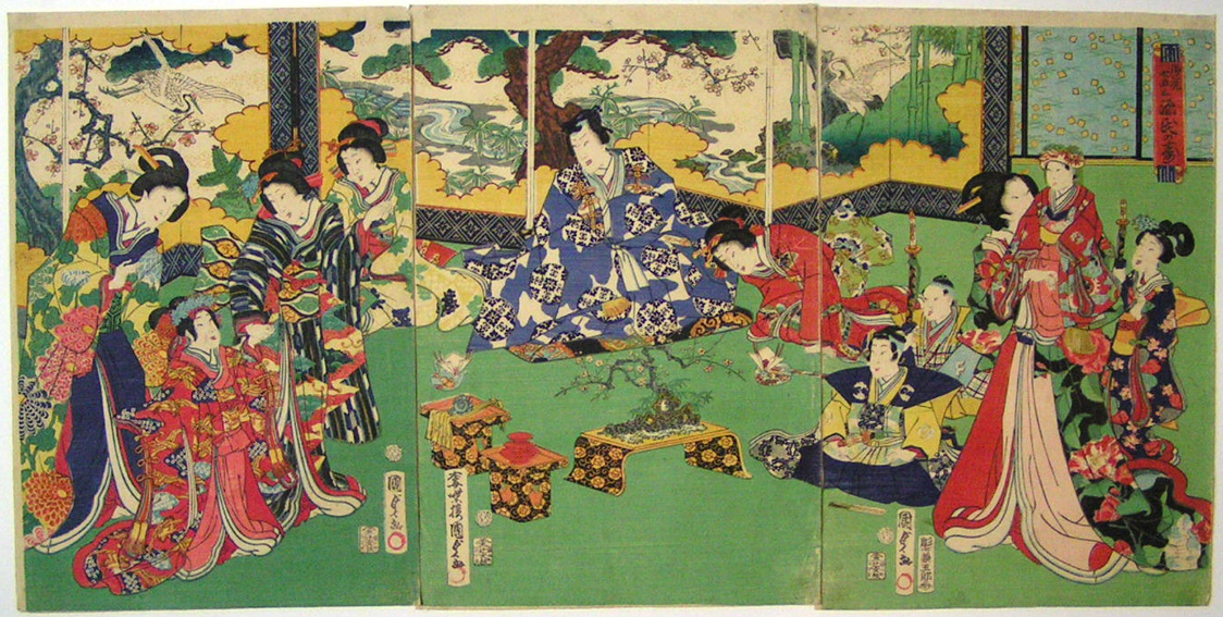 御祝七五三 源氏の寿